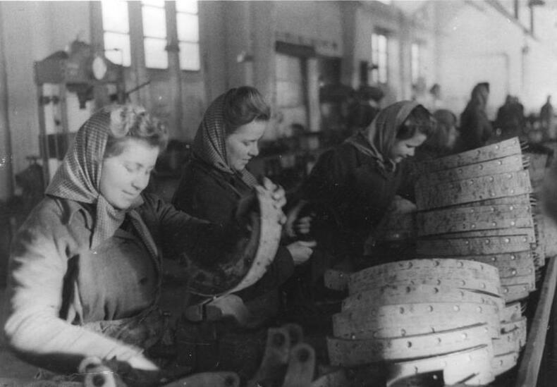 Berlin, sowjetische Zwangsarbeiterinnen ADN- ZB -Archiv II. Weltkrieg 1939-45 Berlin, 19. Januar 1945 Sowjetische Arbeiter und Arbeiterinnen arbeiten in einem Kraftfahr-Instandsetzungswerk der faschistischen Wehrmacht. Hier werden aus dem Material unbrauchbarer Autos neue Wagen hergestellt. Aufnahme: Plenik, Scherl Bilderdienst